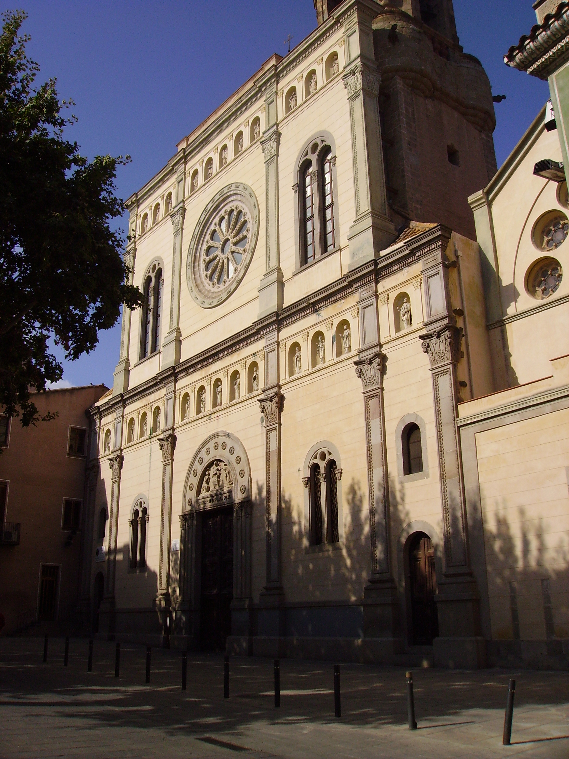 Església de Santa Maria, façana (Mataró, el Maresme, Catalunya).